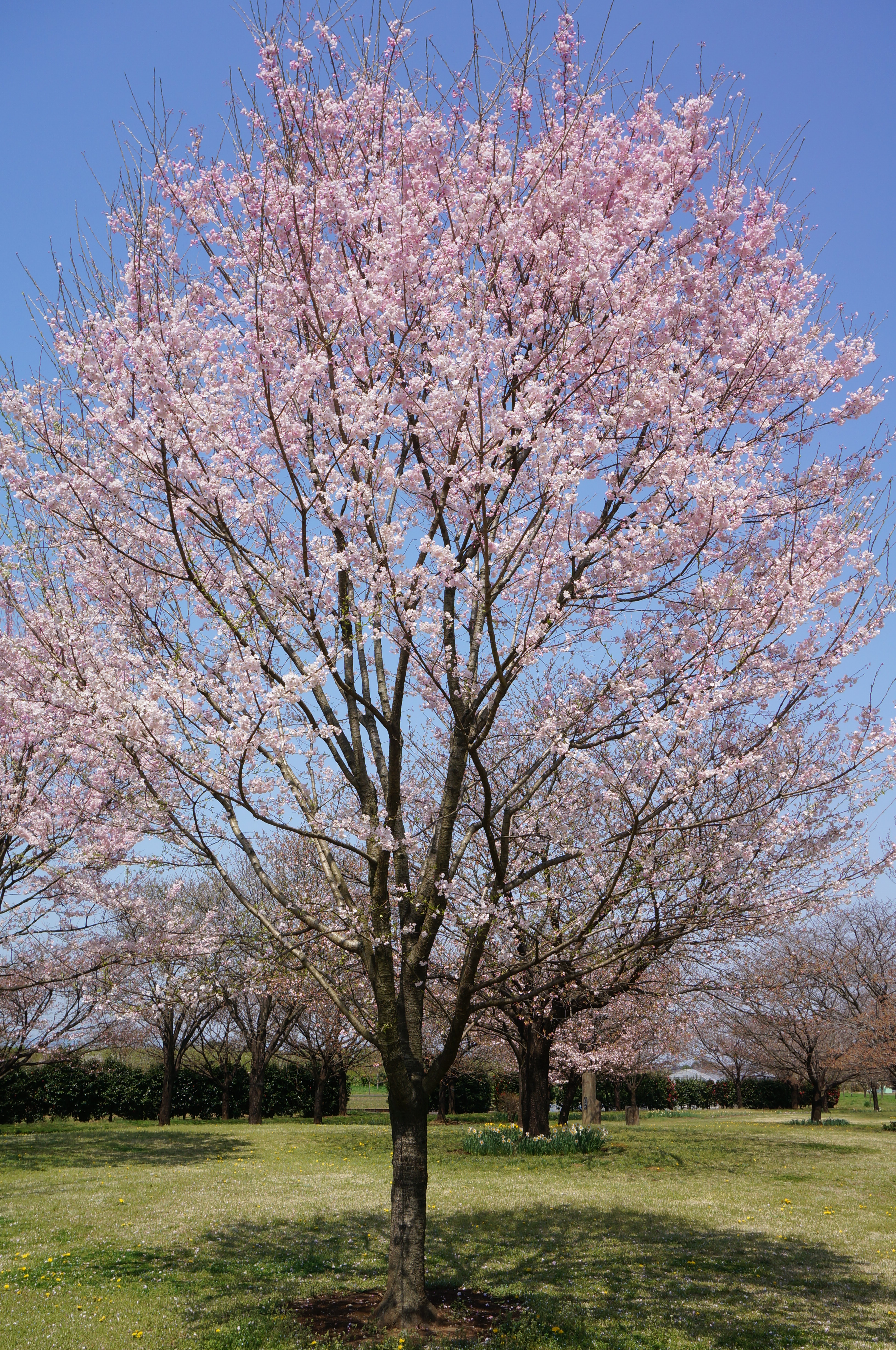 日本花の会 結城農場のマイヒメの原木